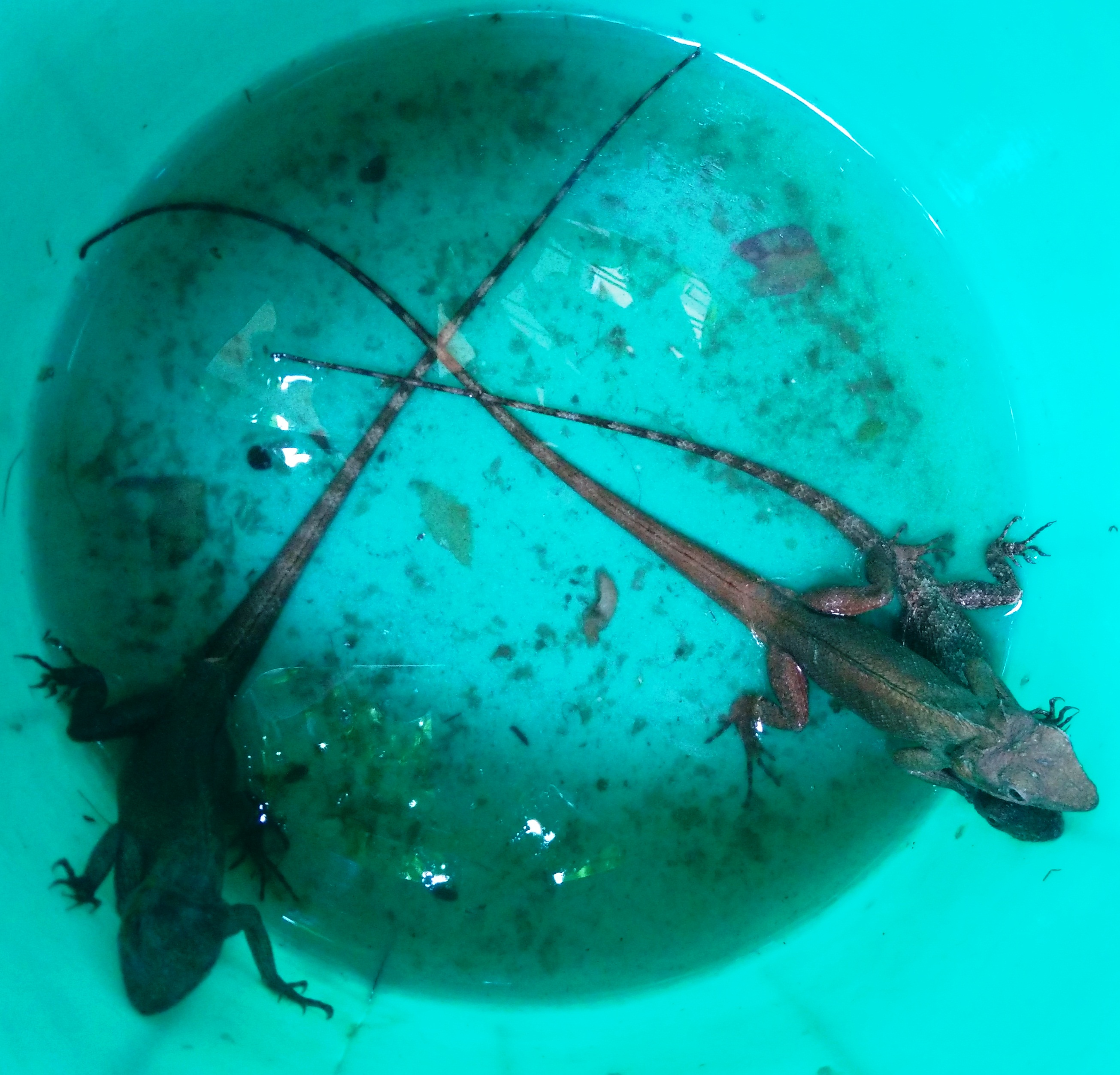 Nhông xám bắt được ở TP